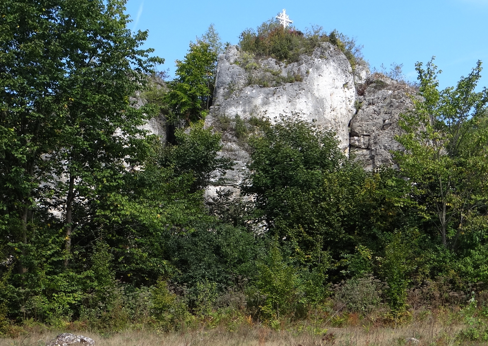 Skały Ule i Słoń w Łutowcu